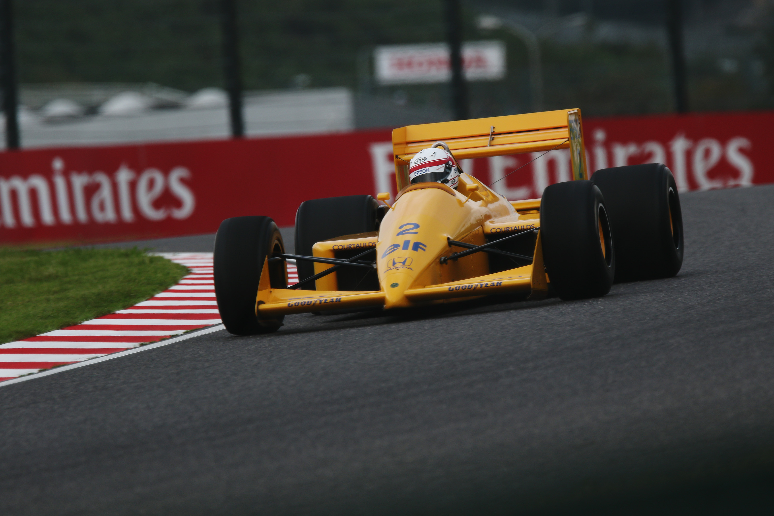 Satoru Nakajima Lotus 100T 2018 Japanese Grand Prix.